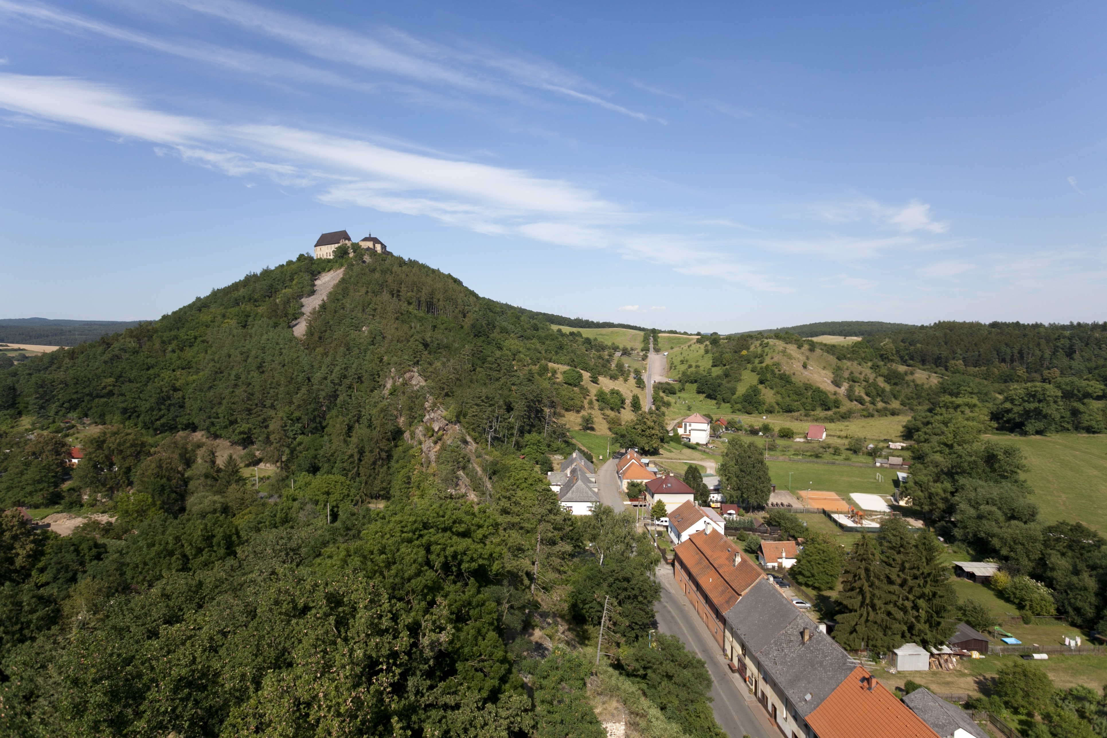 Hrad Točník, Točník 10, Točník.